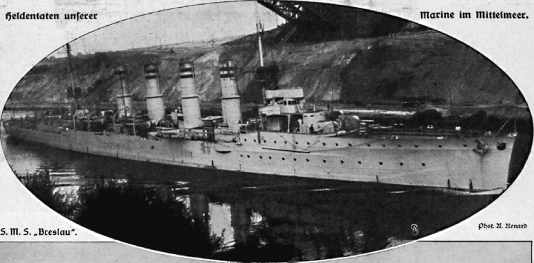 S. M. S. „Breslau“.